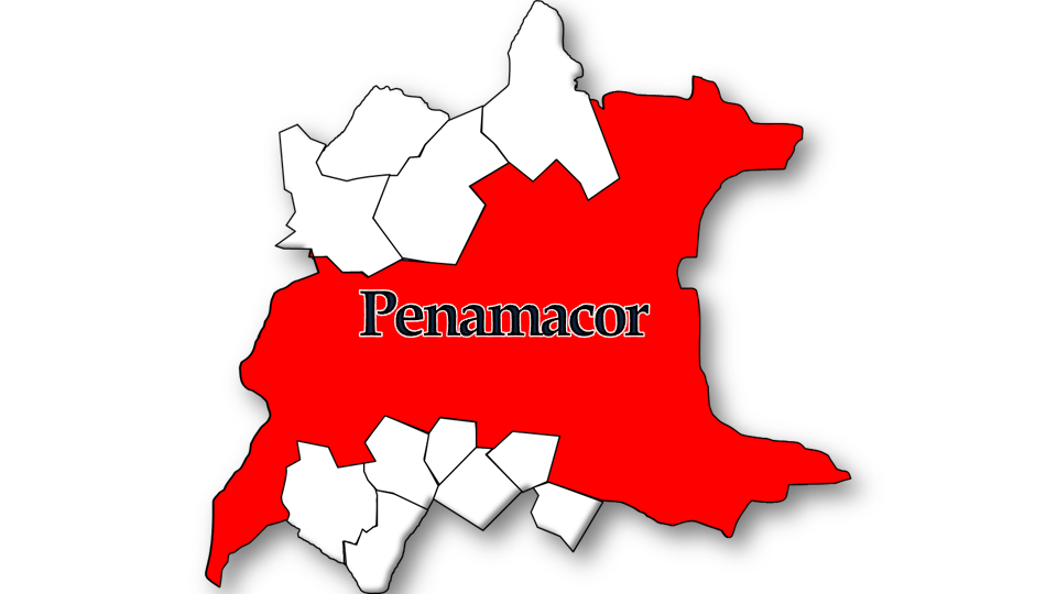 População